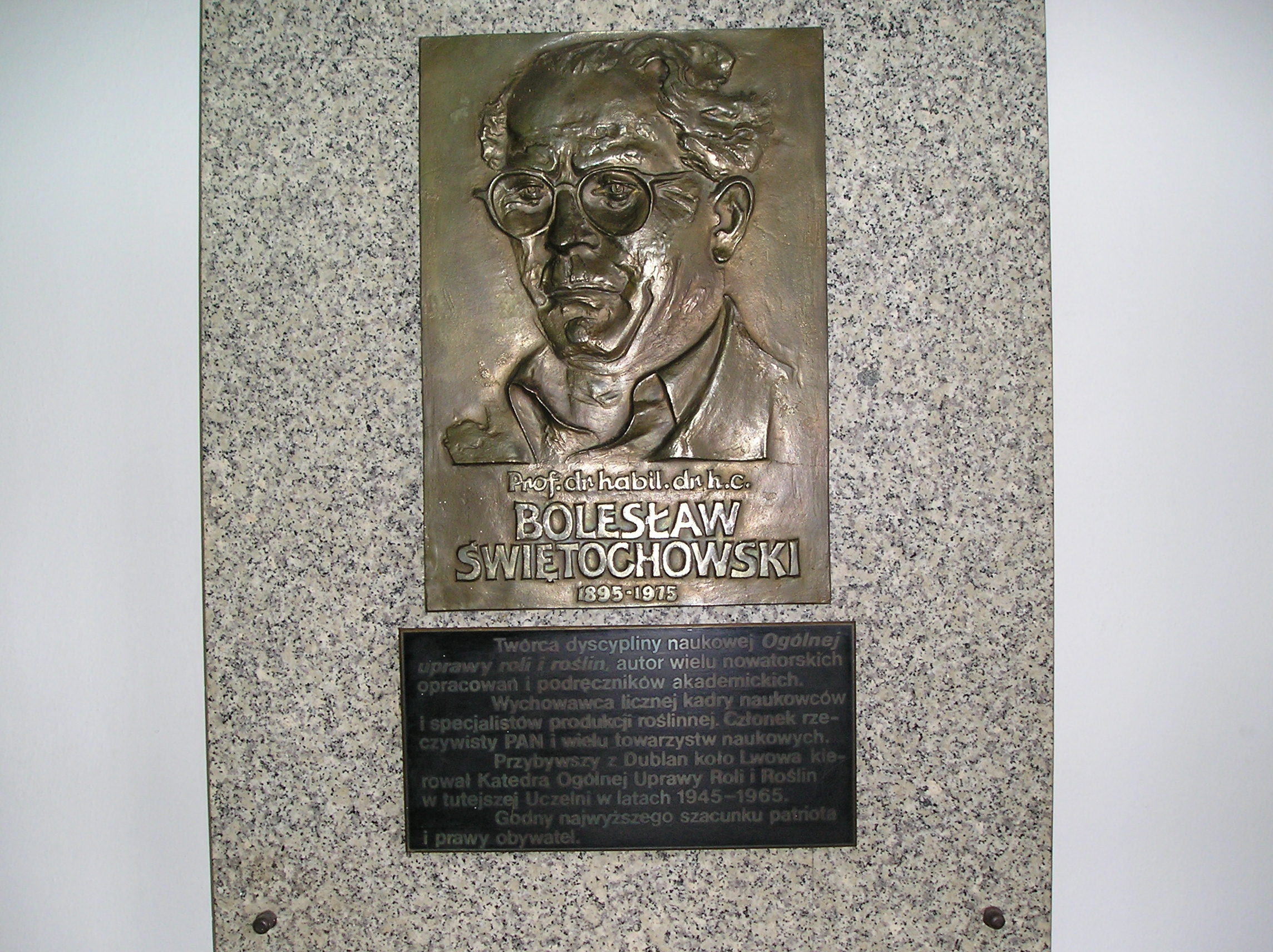 Tablica pamiątkowa na Uniwersytecie Przyrodniczym we Wrocławiu w sali wykładowej przy ul. Norwida 25